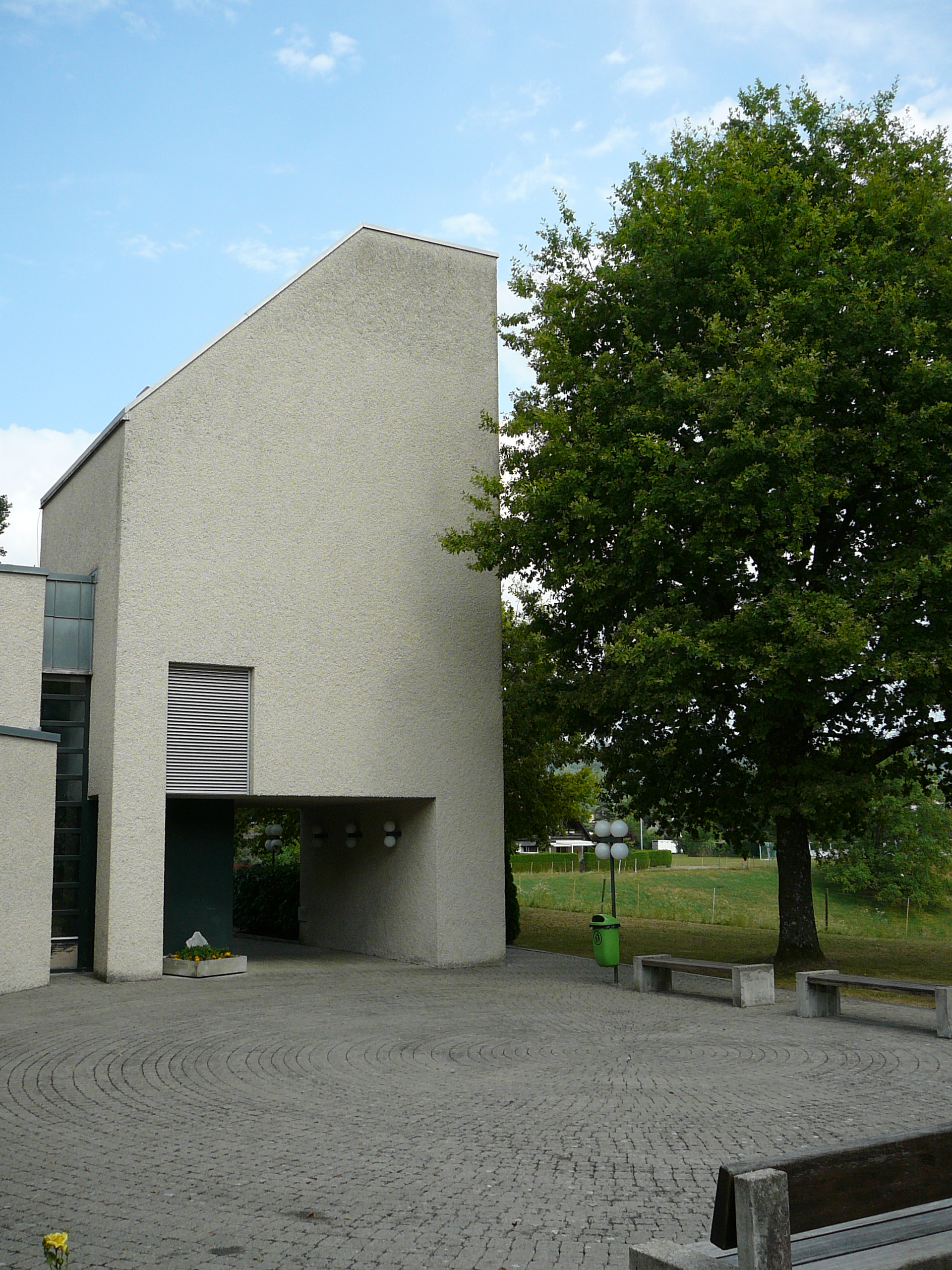 Römisch-katholisches Pfarreizentrum St. Petrus Embrach, Kirchturm